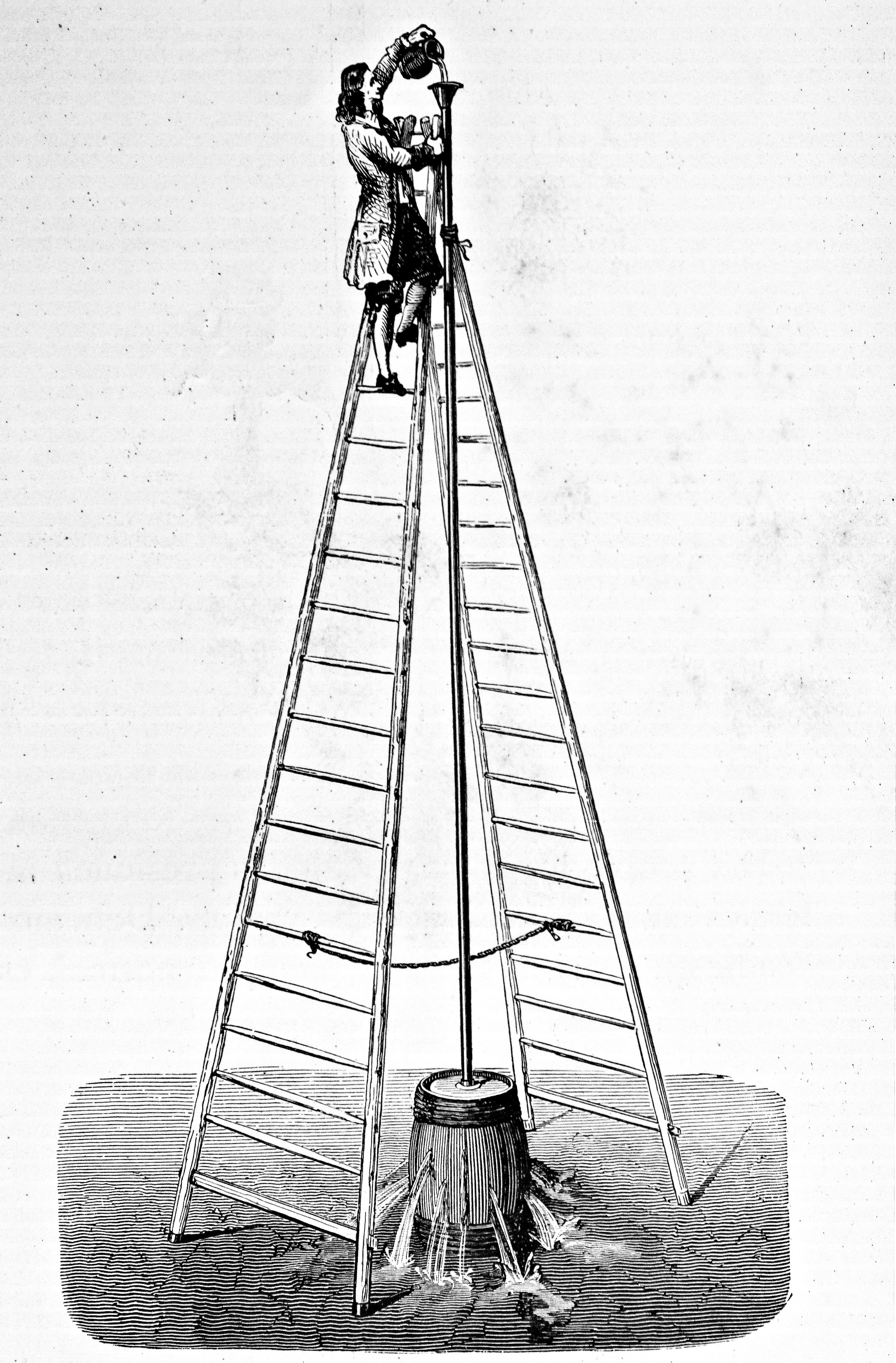 "Paradoja hidrostática, rompetoneles de Pascal". Ilustraciones pertenecientes al libro : El mundo físico : gravedad, gravitación, luz, calor, electricidad, magnetismo, etc. / A. Guillemin. - Barcelona Montaner y Simón, 1882